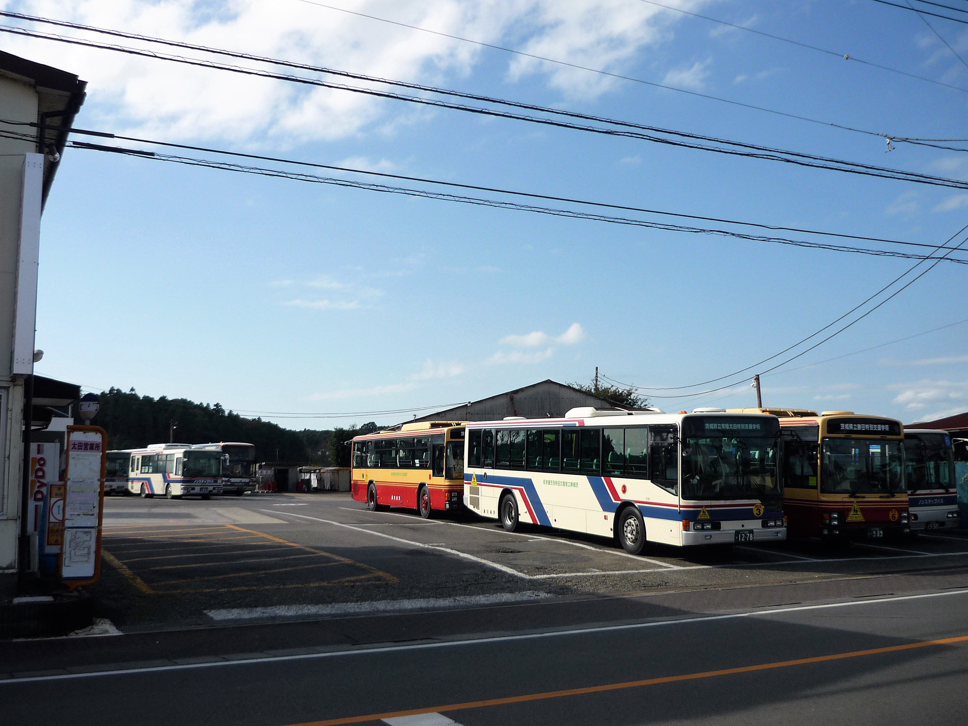 茨城交通太田営業所 Panasonic Lumix DMC-FS3